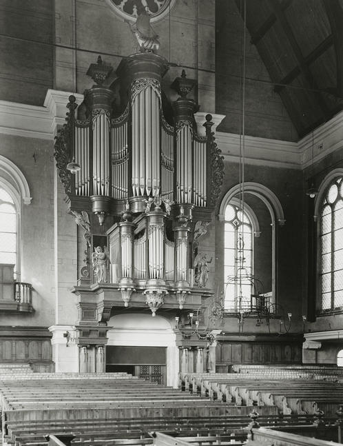 Orgel Nieuwekerk Katwijk